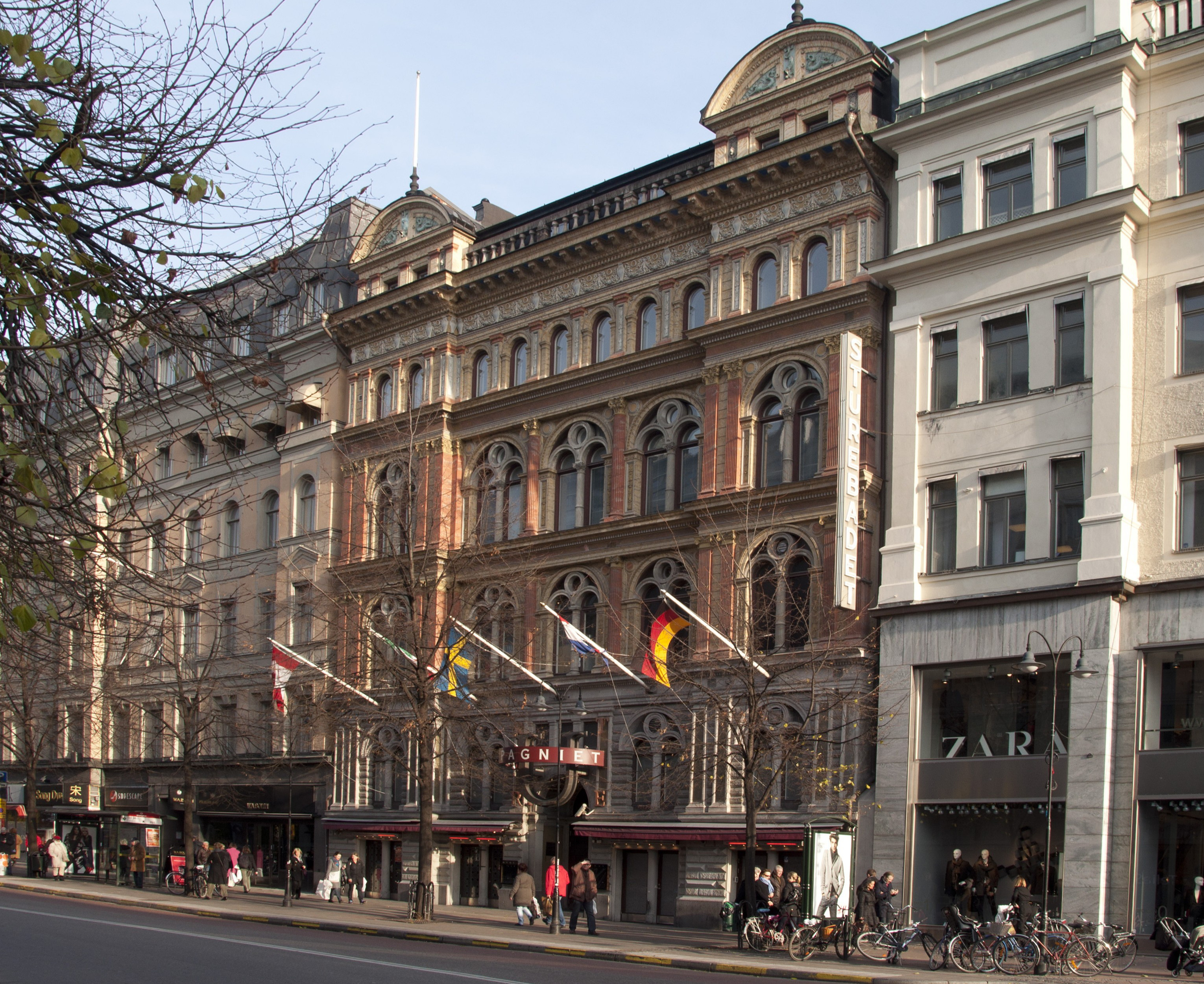 Byggnadsår 1883-85, arkitekter Petter Georg Sundius interiörer, Magnus Isæus och Carl Sandahl samt Gustaf Wickman fasad, byggherre Stockholms Badhus AB genom Carl Curman, byggmästare Hj Lindahl